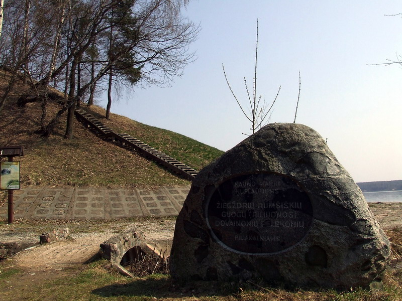 Akmuo Kauno marių nuplautiems Žiegždrių, Rumšiškių, Guogų (Piliuonos), Dovainonių ir Pelekonių piliakalniams atminti.